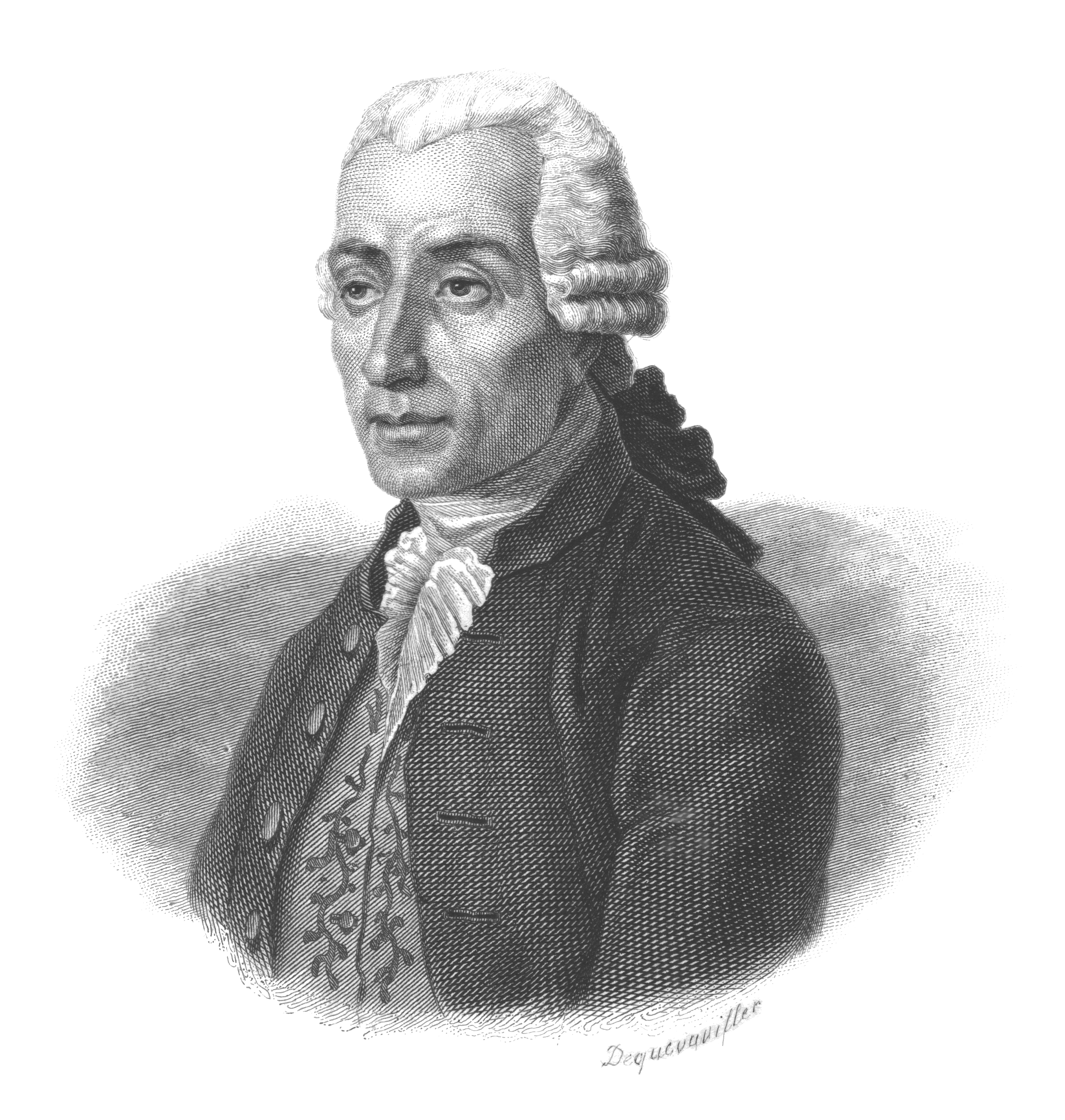 Extrait des « Portraits et histoire des hommes utiles », publiés et propagés pour et par la Société Montyon et Franklin